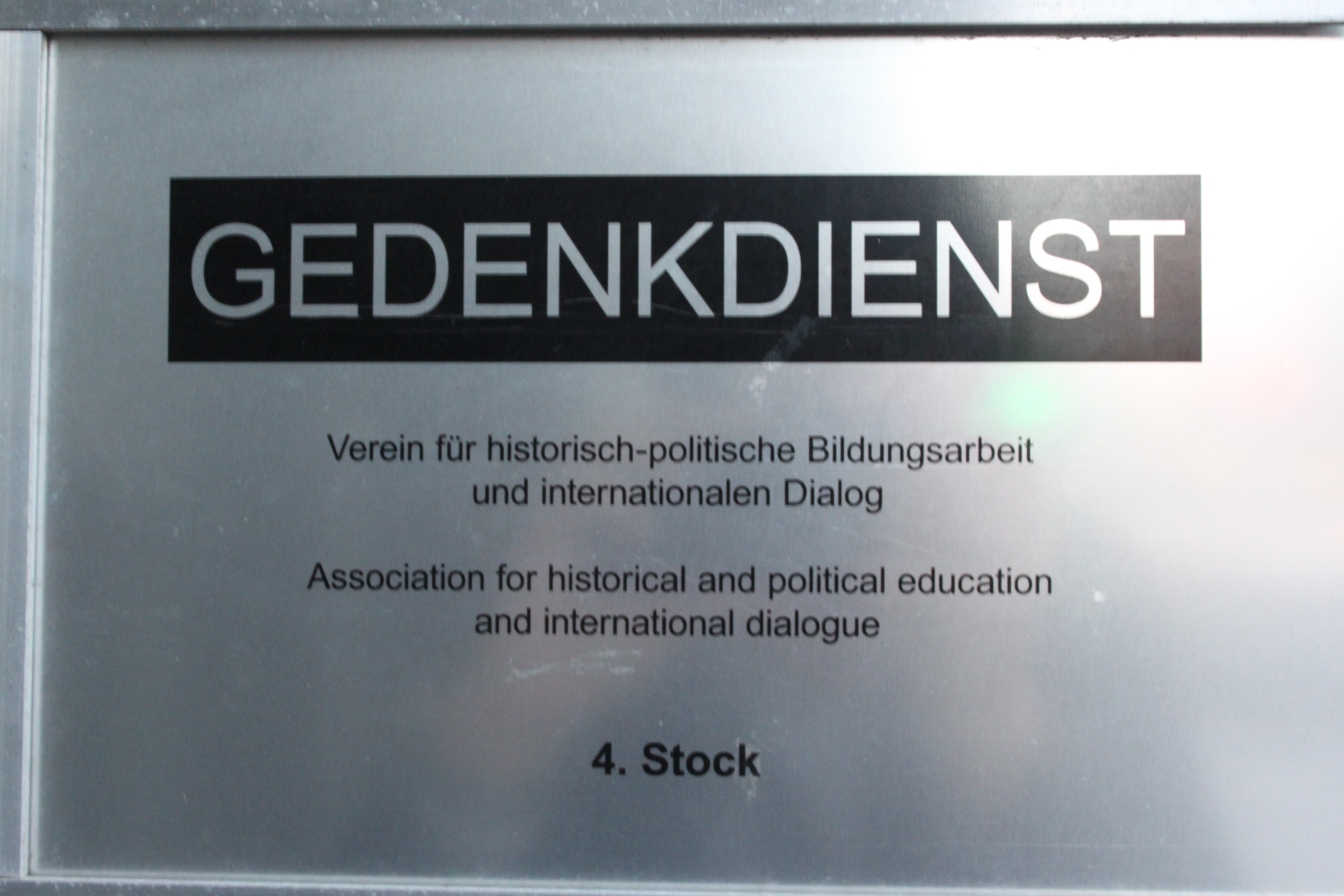 Gedenkdienst 1050 Wien Margaretenstraße 166, Hinweisschild